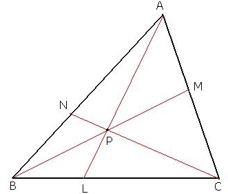 Ceva 1